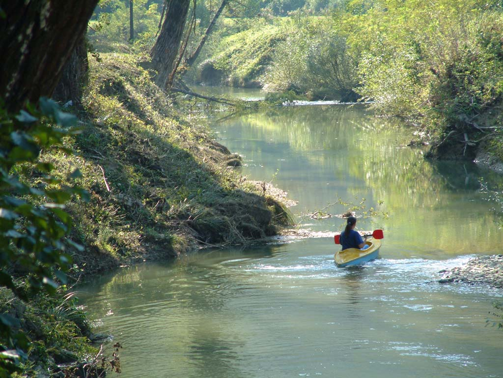 Mirna river, Istria peninsula, Croatia. K. Korlević